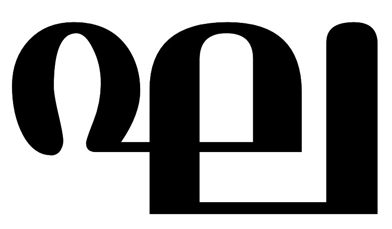 ഘ അക്ഷരം